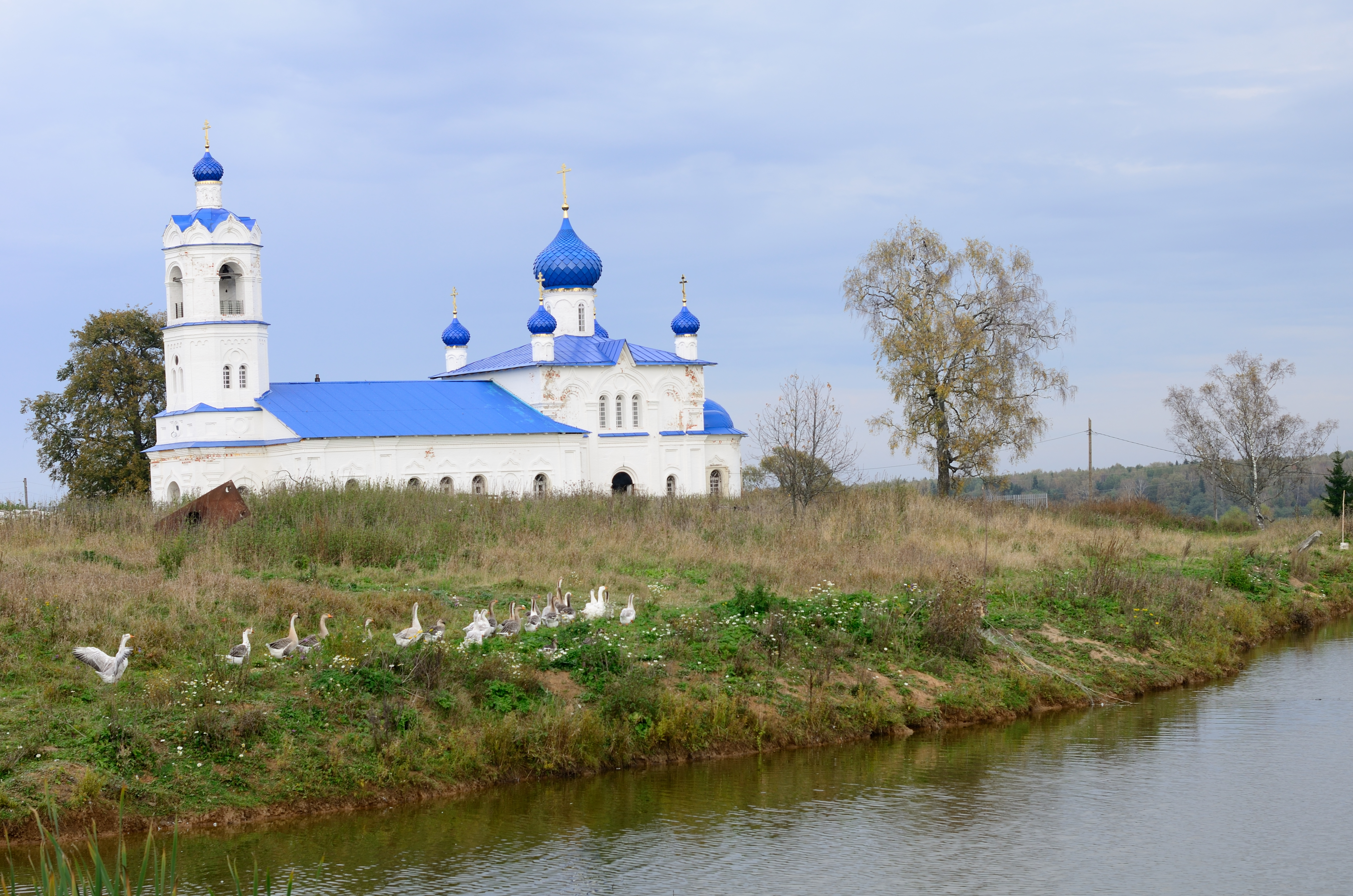 Колокольня, 1860 г. (Владимирская область, Юрьев-Польский, село Малолучинское)